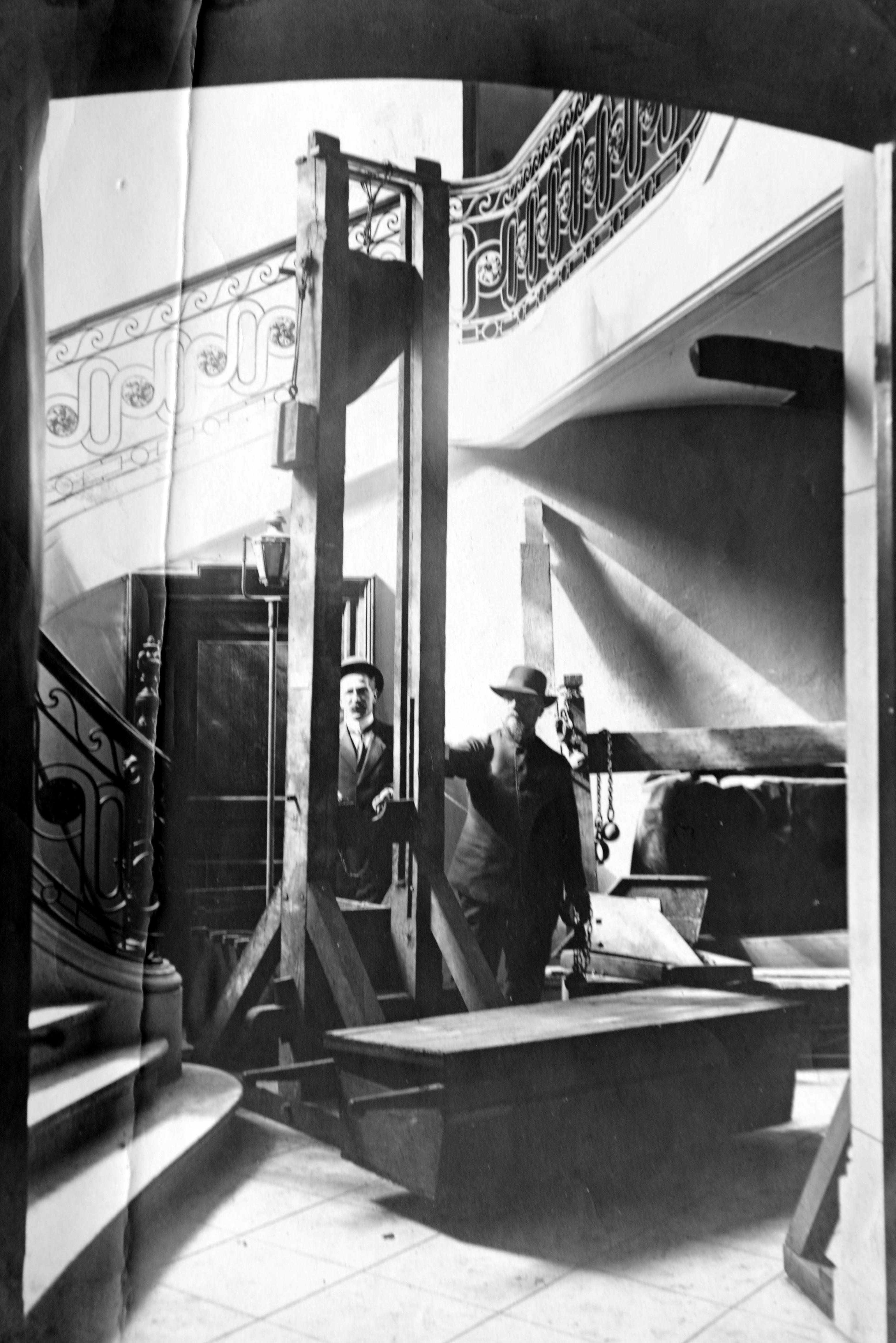 De Putty Stein an de Guido Oppenheim examinéieren eng ausgestallte Guillotine.